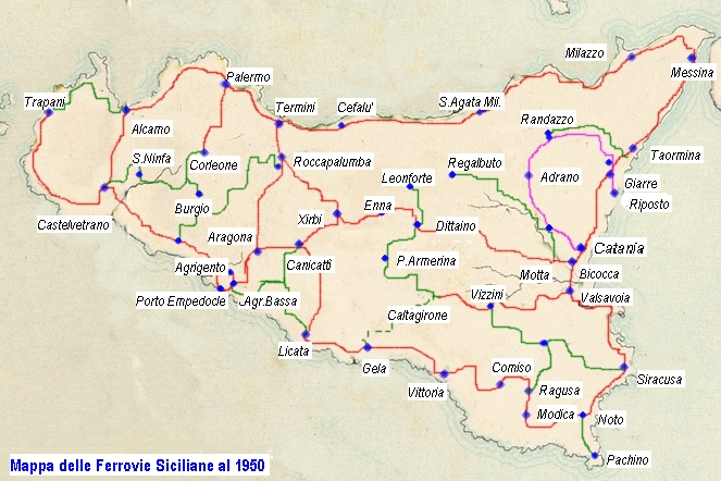 Mappa della rete ferroviaria della Sicilia nel 1950.